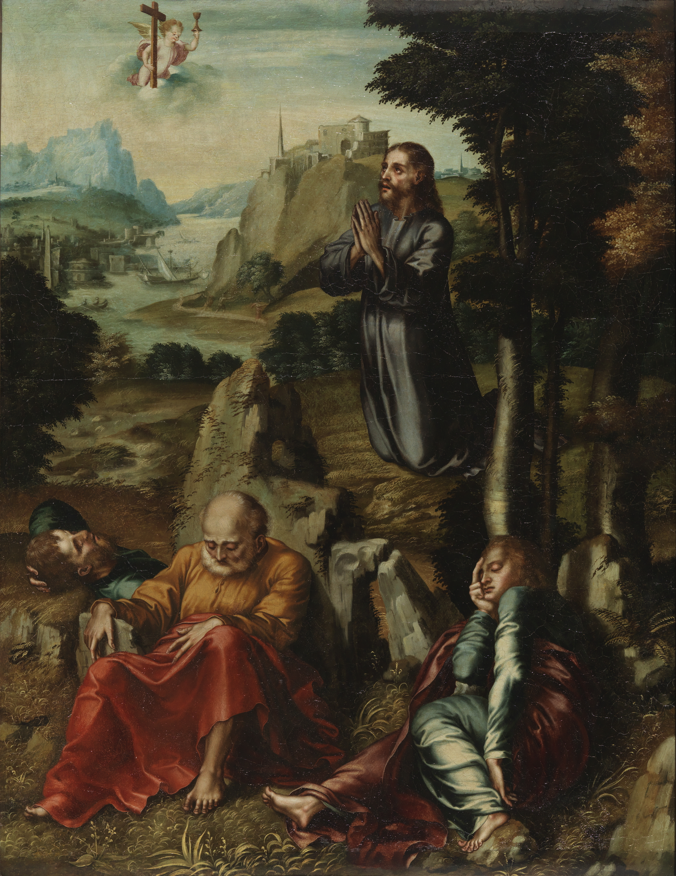 La obra representa a Jesucristo rezando en el monte de los Olivos en la víspera de su pasión y muerte.